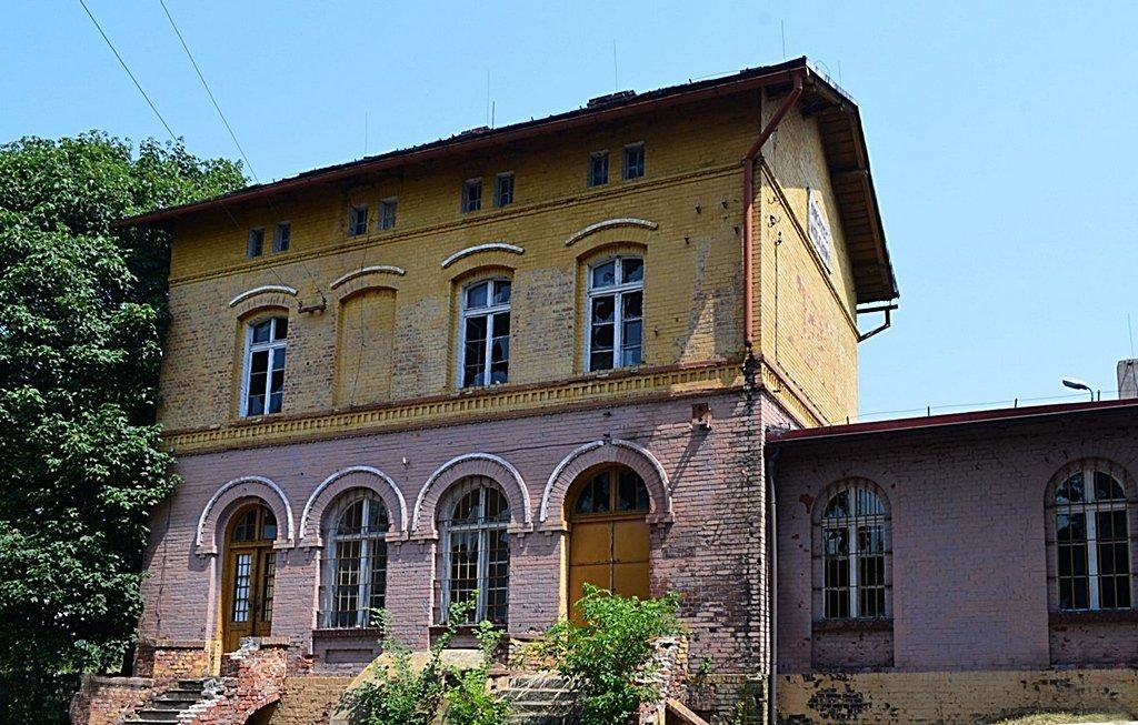 Widok dworca od strony ulicy